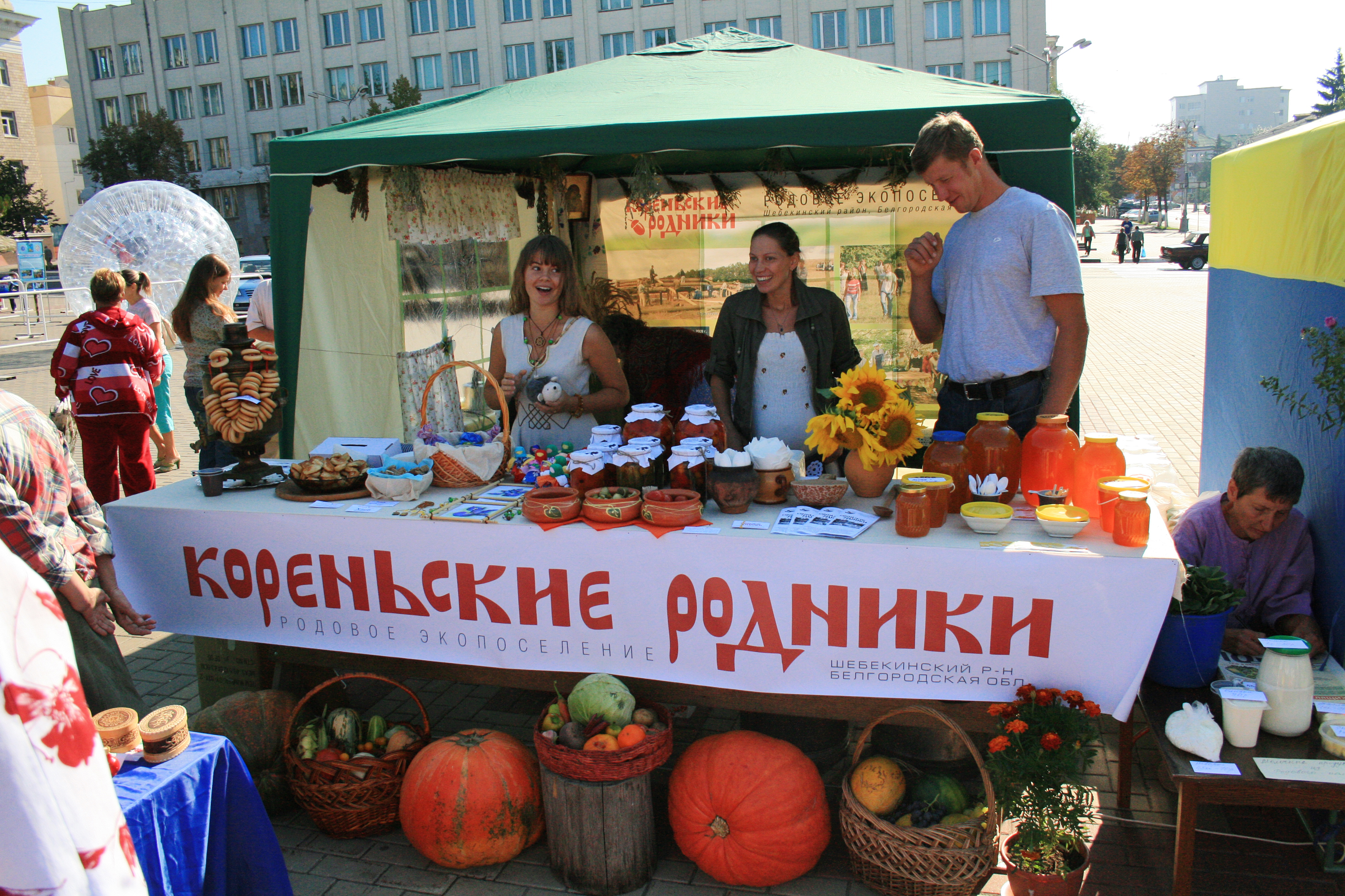 Родовое экопоселение «Кореньские родники» на ярмарке «Белгородская слобода» в составе группы Шебекинского района. Белгород, 27 августа 2011 г.